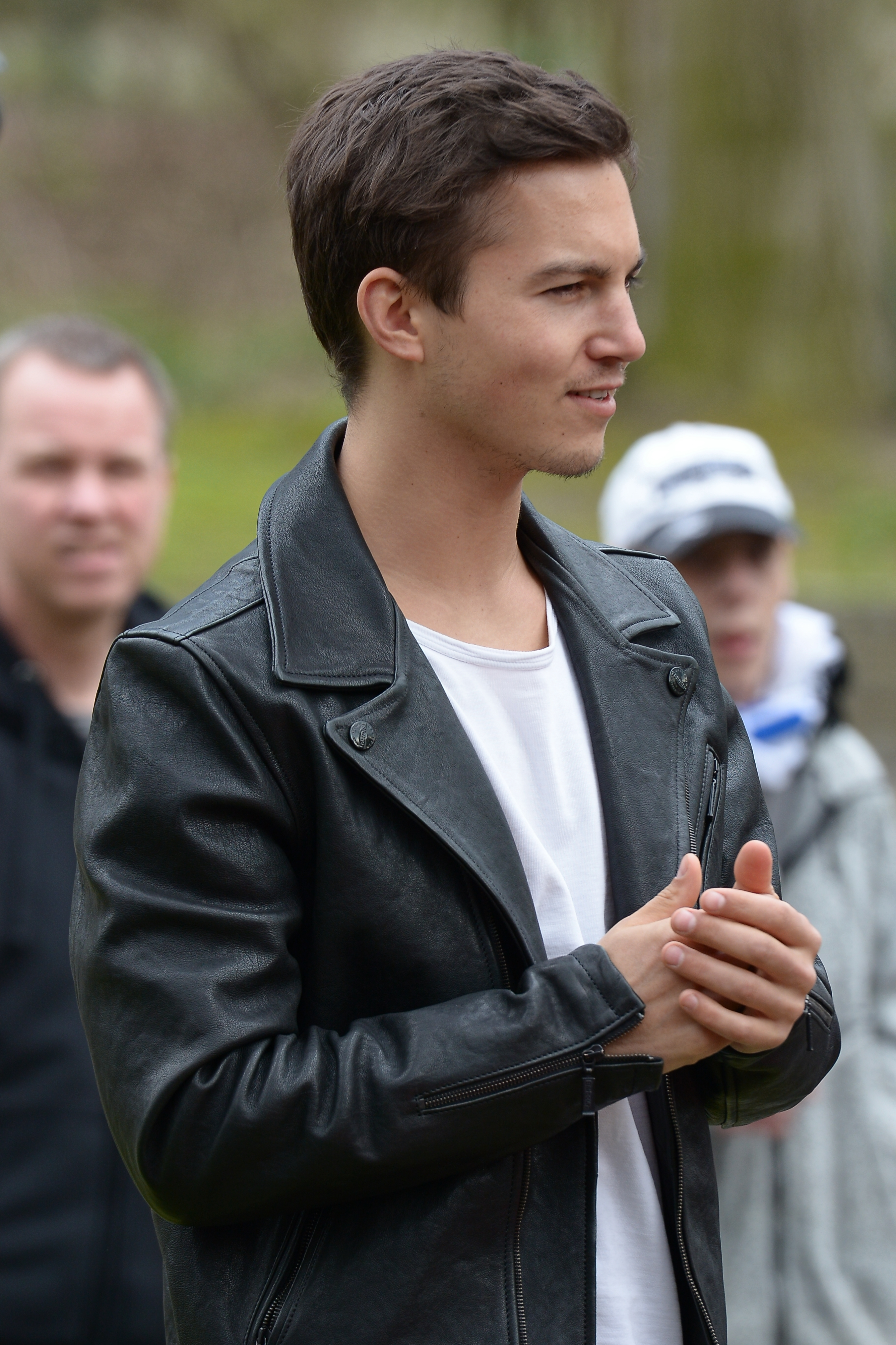 Verleihung des Grimme-Preises 2016.